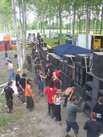 Foto di un Free Party organizzato in italia nel 2008